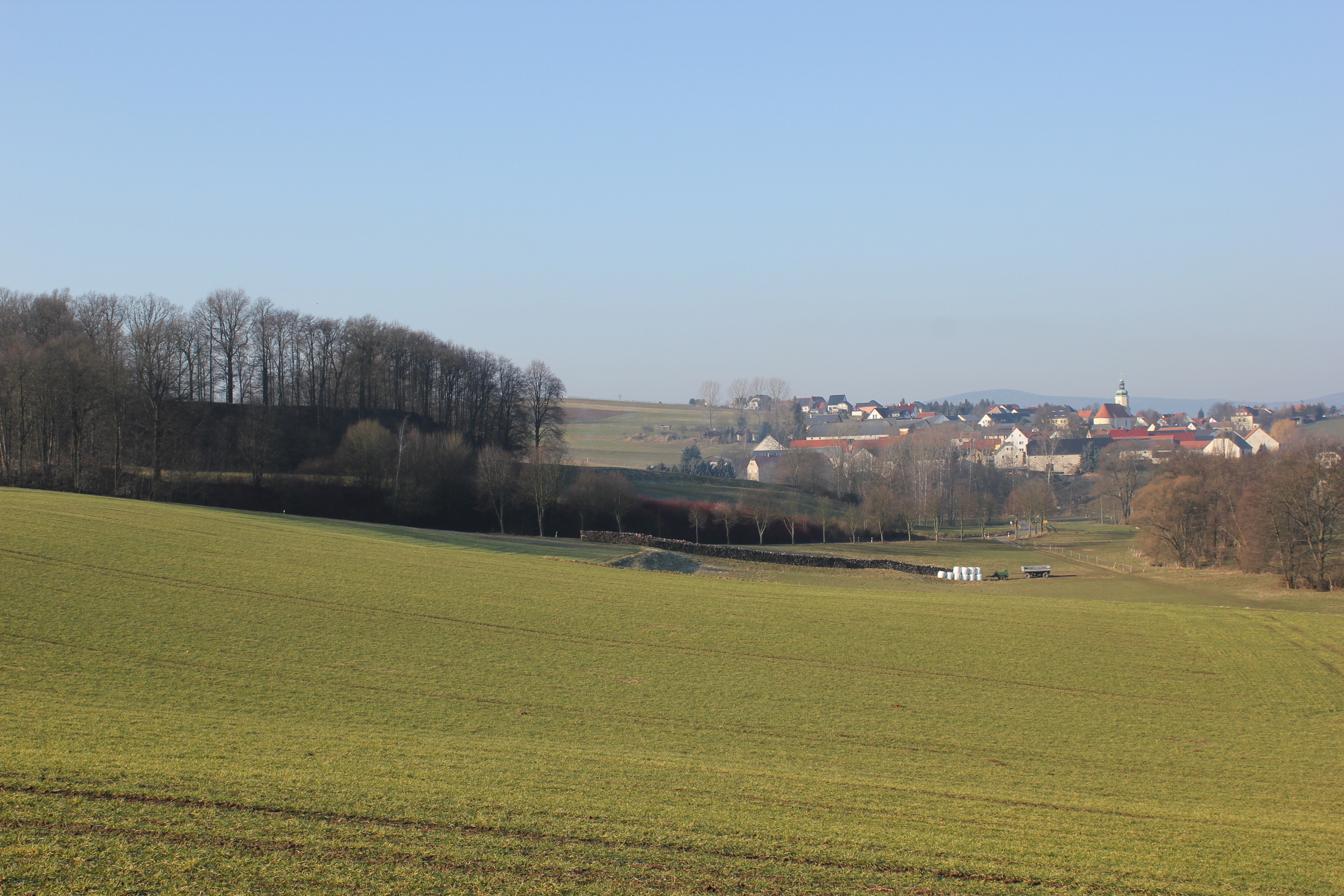 Hornjoserbsce: Wotrow z hrodźišćom z wuchoda.